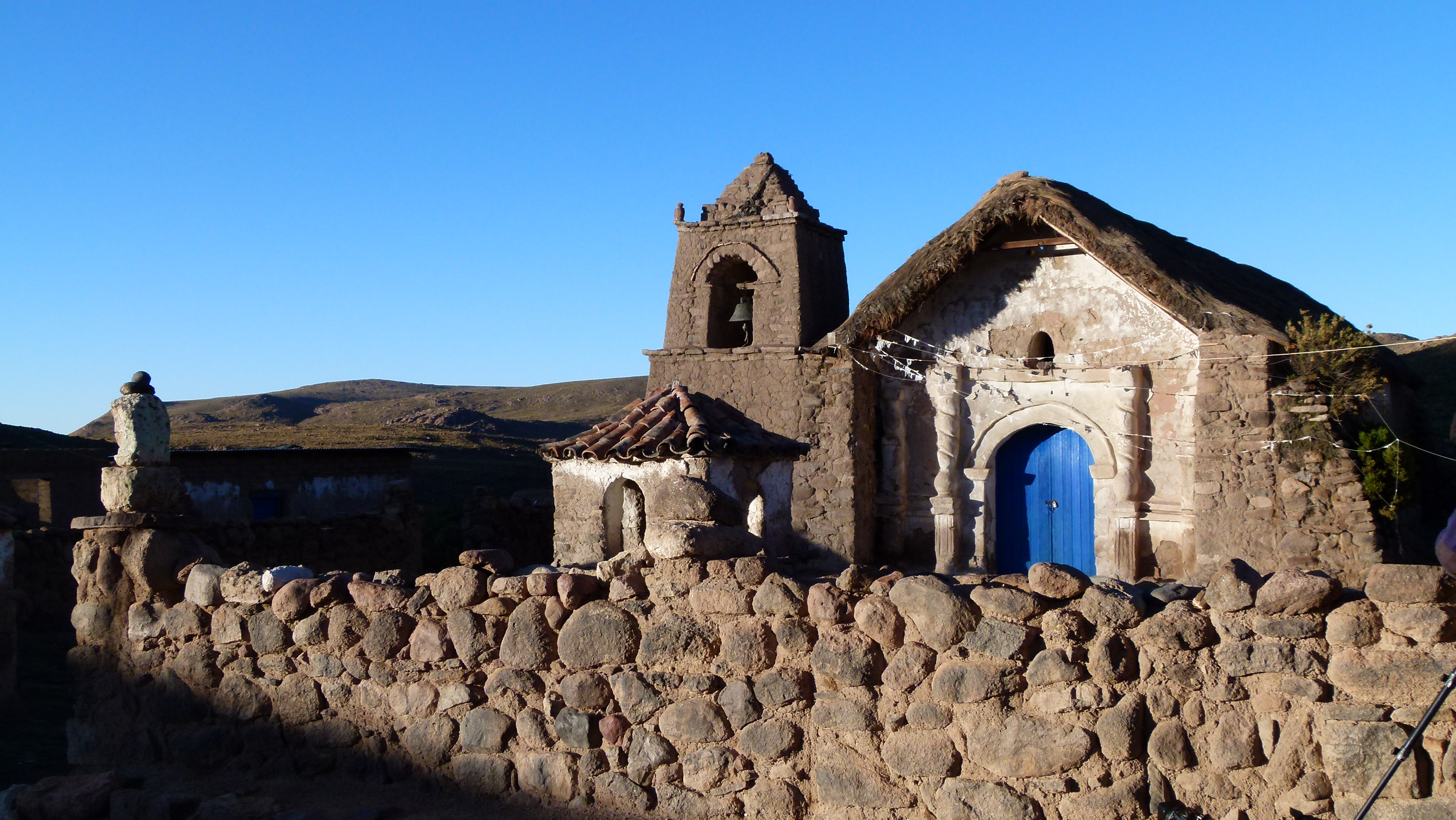 Atrio, calvario, campanario y fachada Iglesia Virgen de la Natividad de Mulluri This is a photo of a national monument in Chile: 969